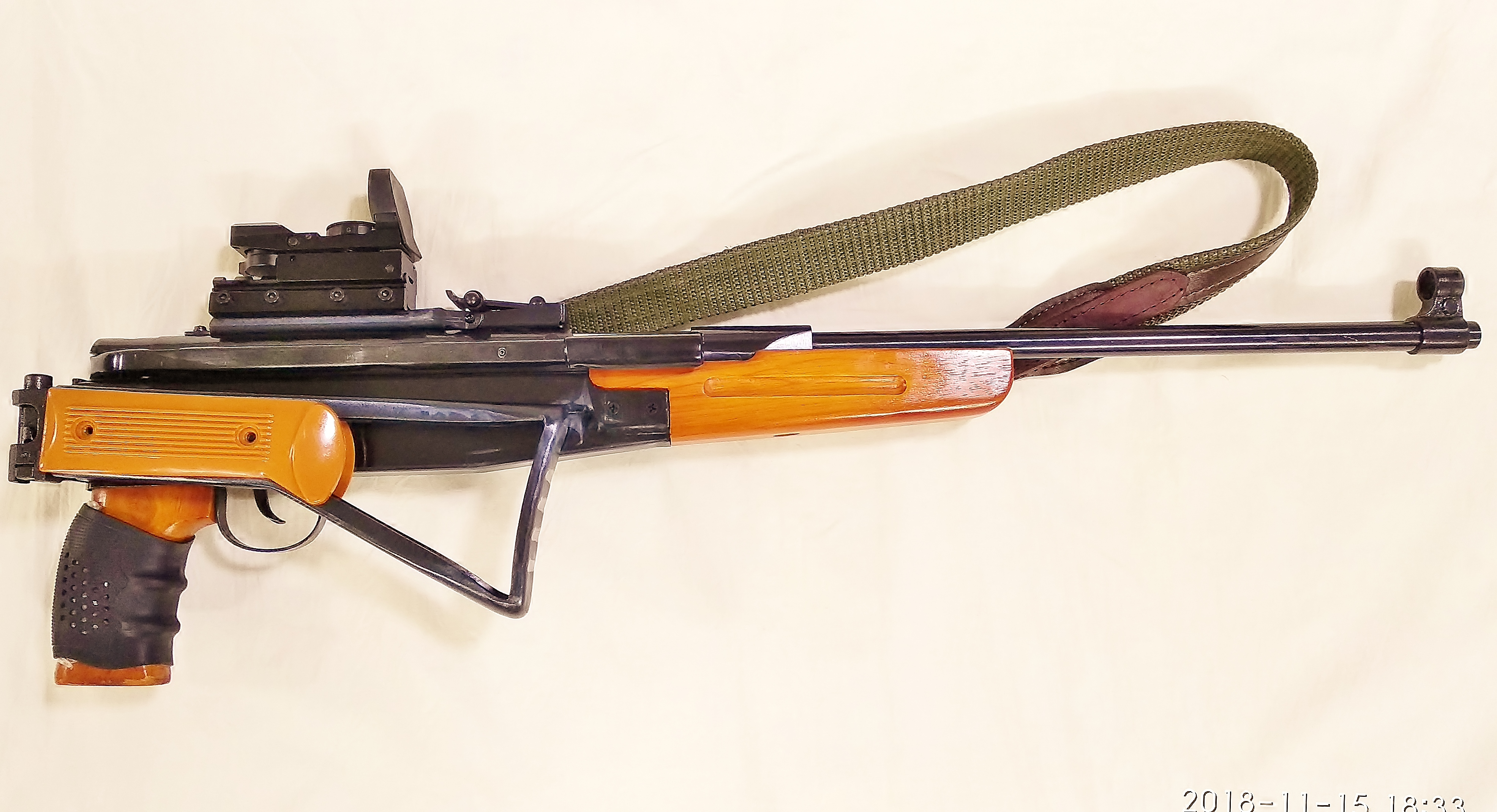 تفنگ بادی فنر پیستون اهرم از بغل